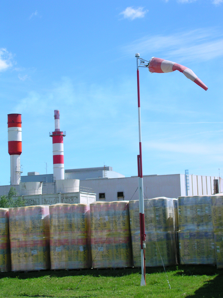 société SAINT GOBAIN, production de panneaux isolant